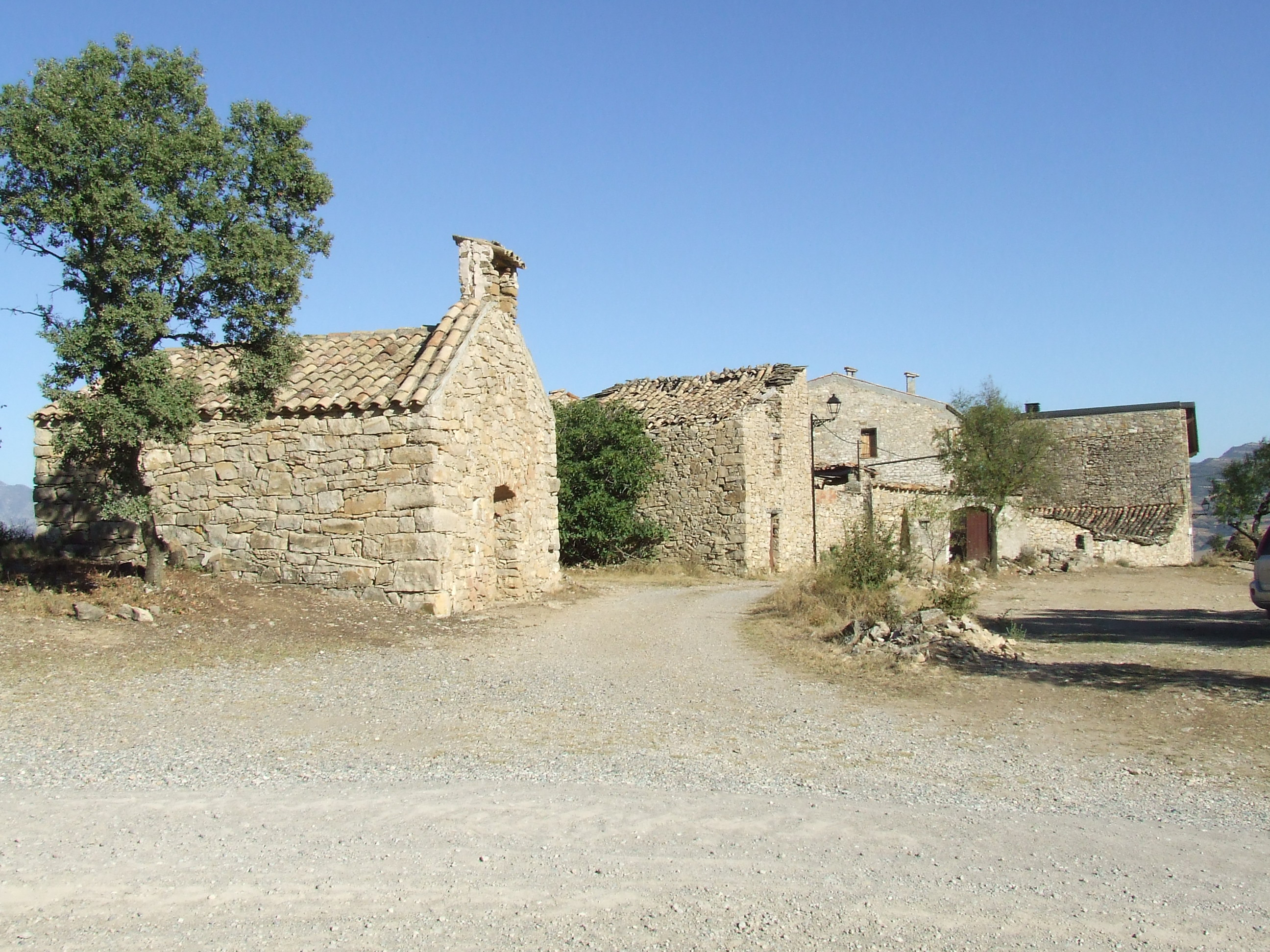 Puigmaçana (Mur, Castell de Mur, Pallars Jussà)